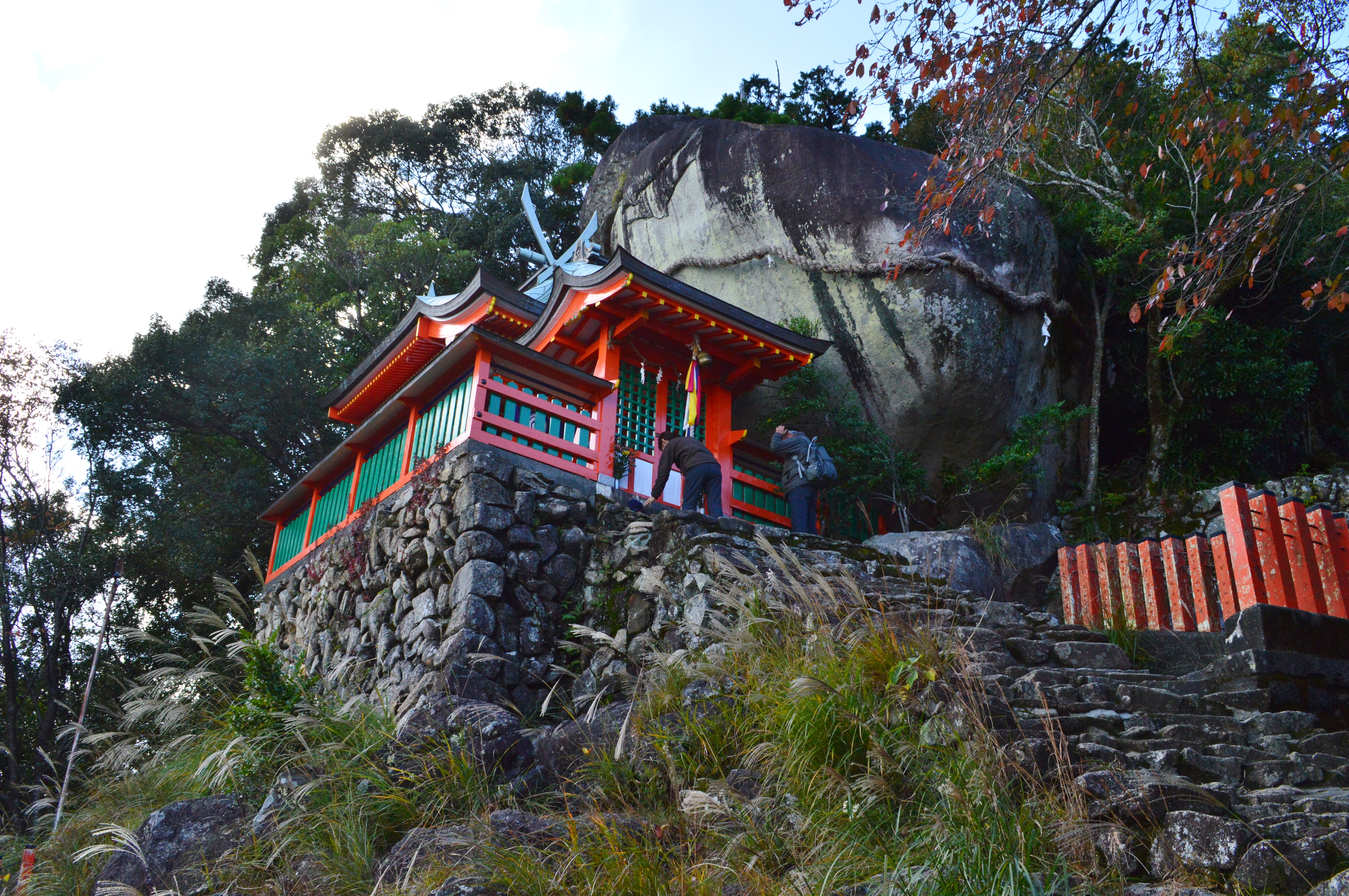 神倉神社 社殿